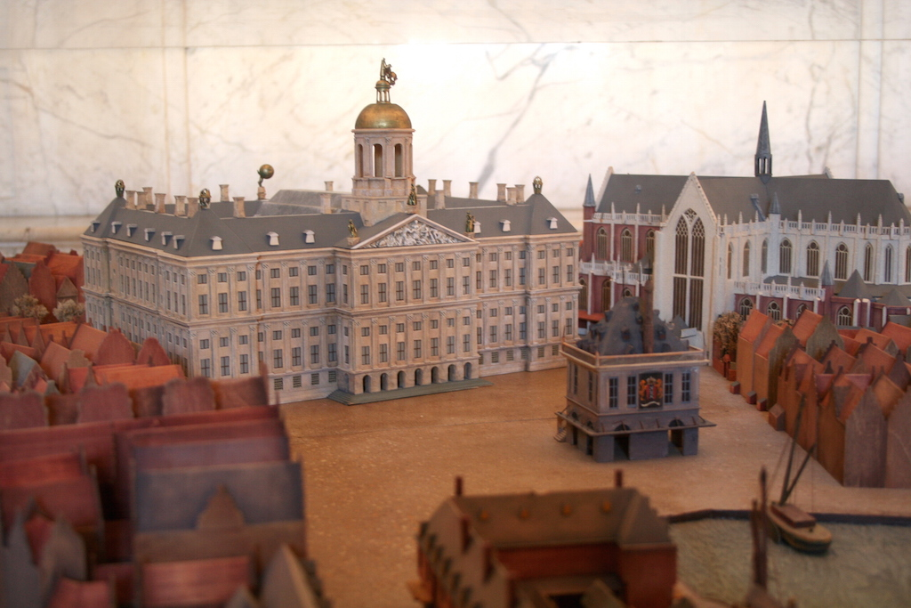 Maquette Dam, Paleis, Waag. Geëxposeerd in het Paleis op de Dam; 2005. Foto: Erik Swierstra.